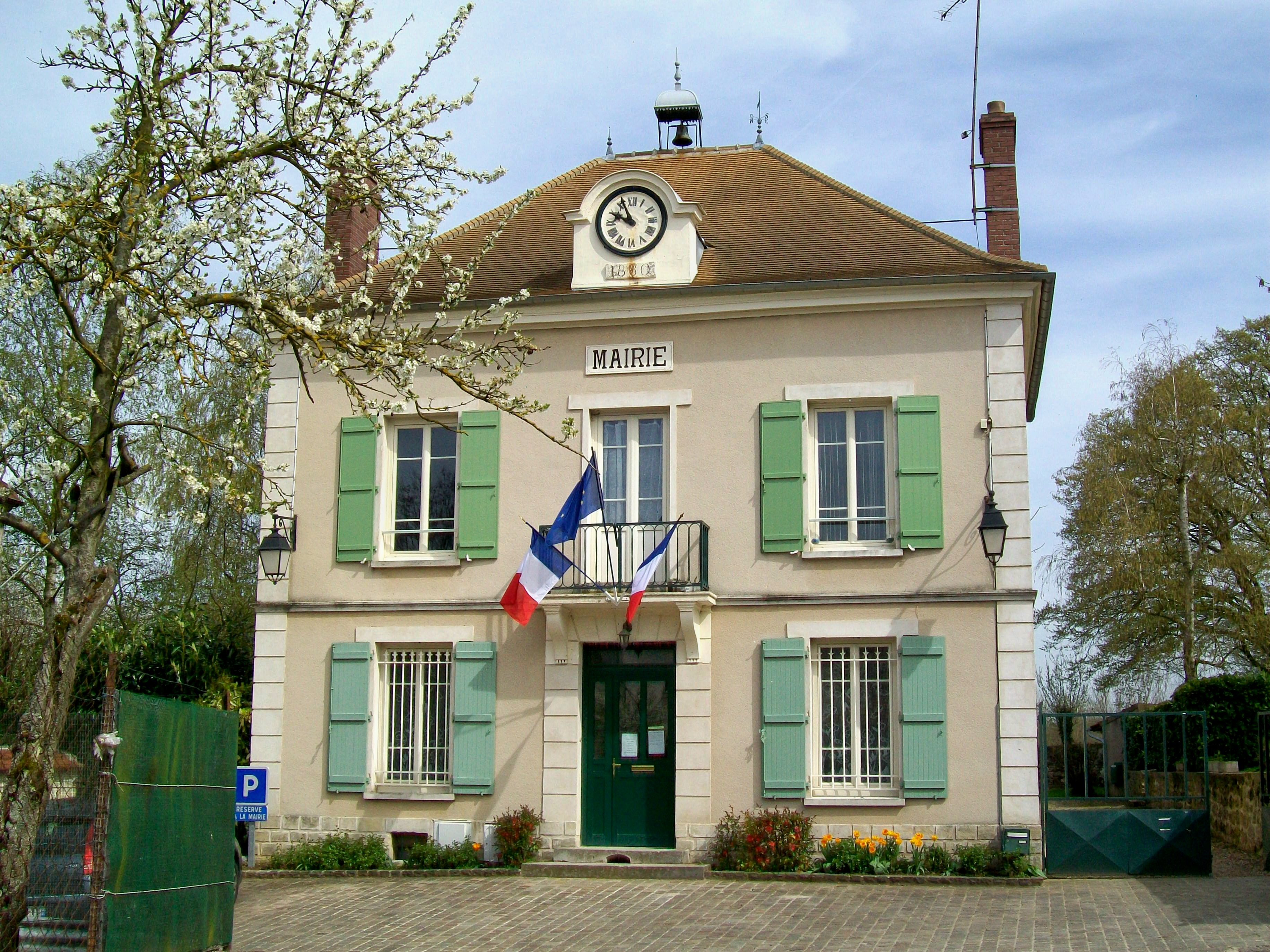 La mairie du Plessis-Luzarches.